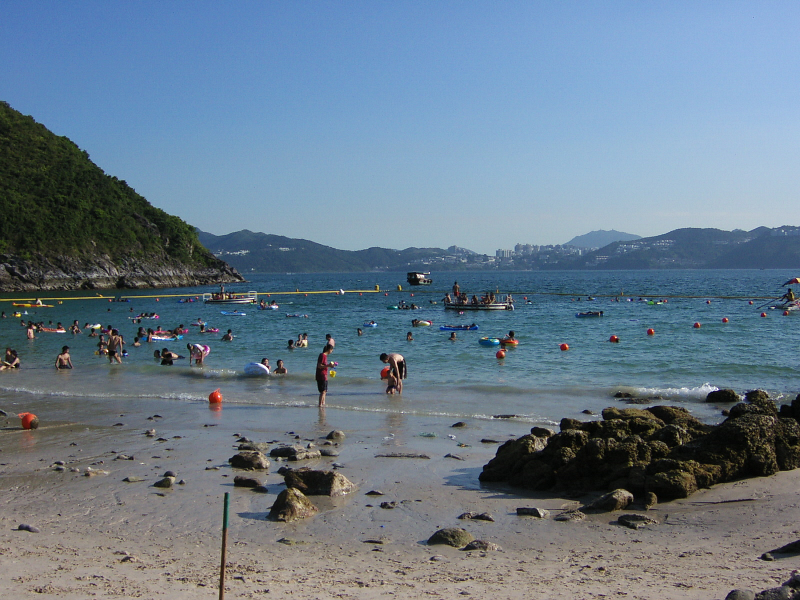 中文（香港）: 廈門灣／半月灣。